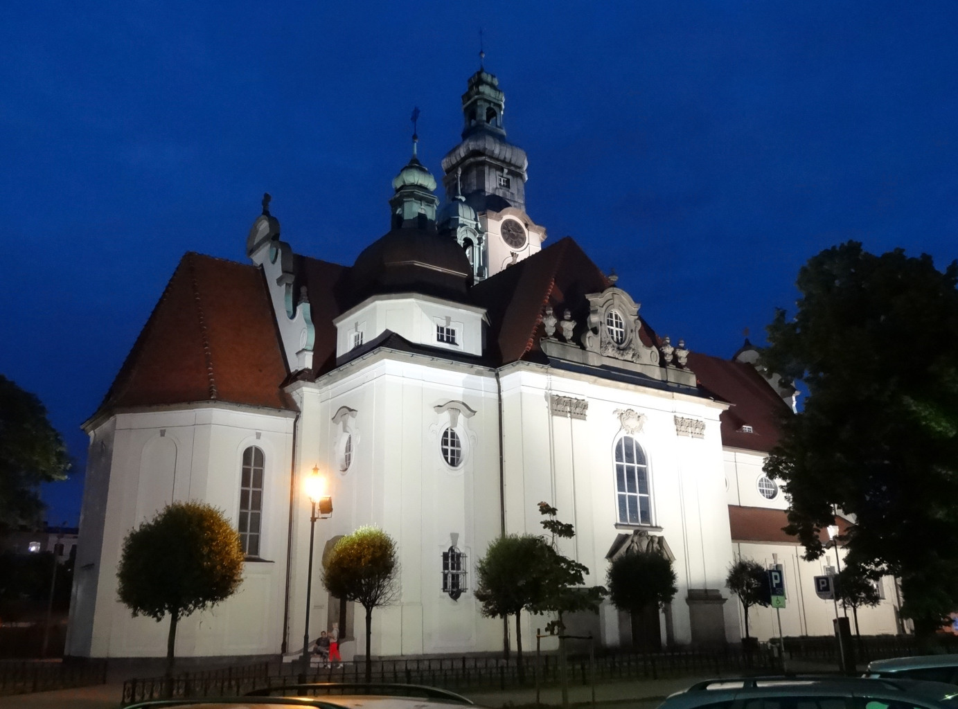 Kościół Najświętszego Serca Pana Jezusa w Bydgoszczy, zbud. 1913 r.